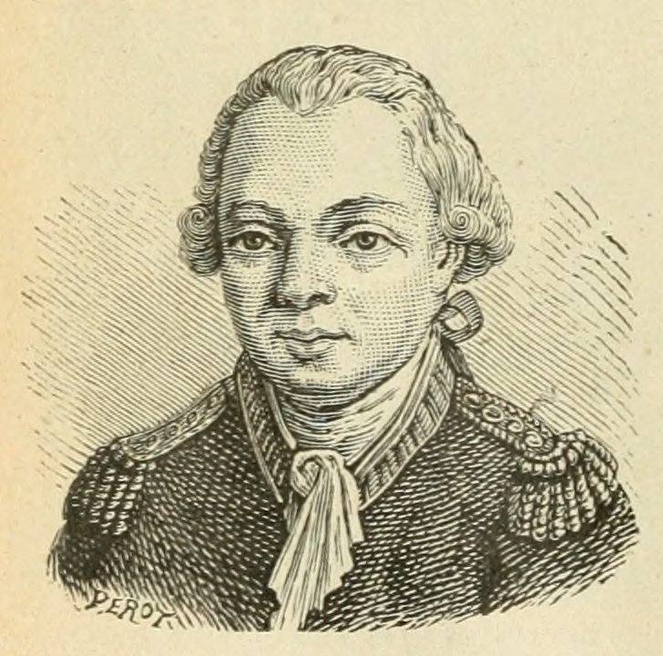 Le tour de la France par deux enfants, par George Bruno, manuel scolaire, édition de 1904.